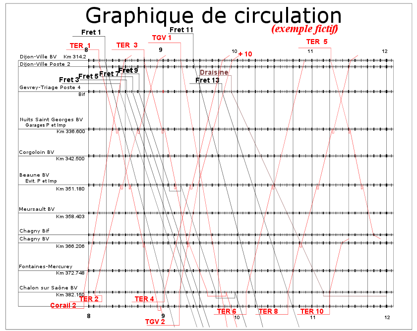 Graphique de circulation ferroviaire (exemple fictif)